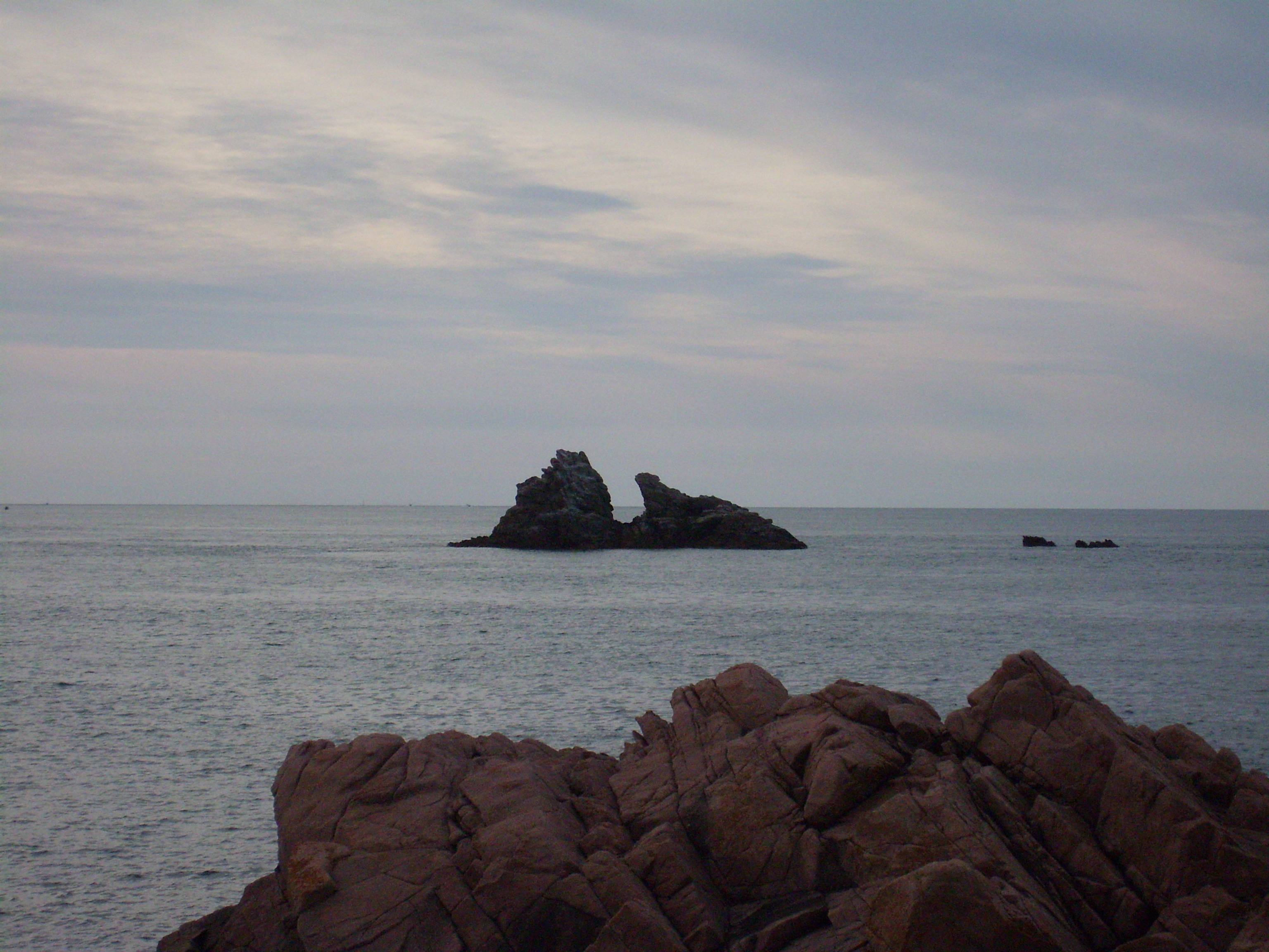 Rocher d'Esquina, dans la baie d'Ecuty, à l'est de l'Anse Saint-Martin, Digulleville.